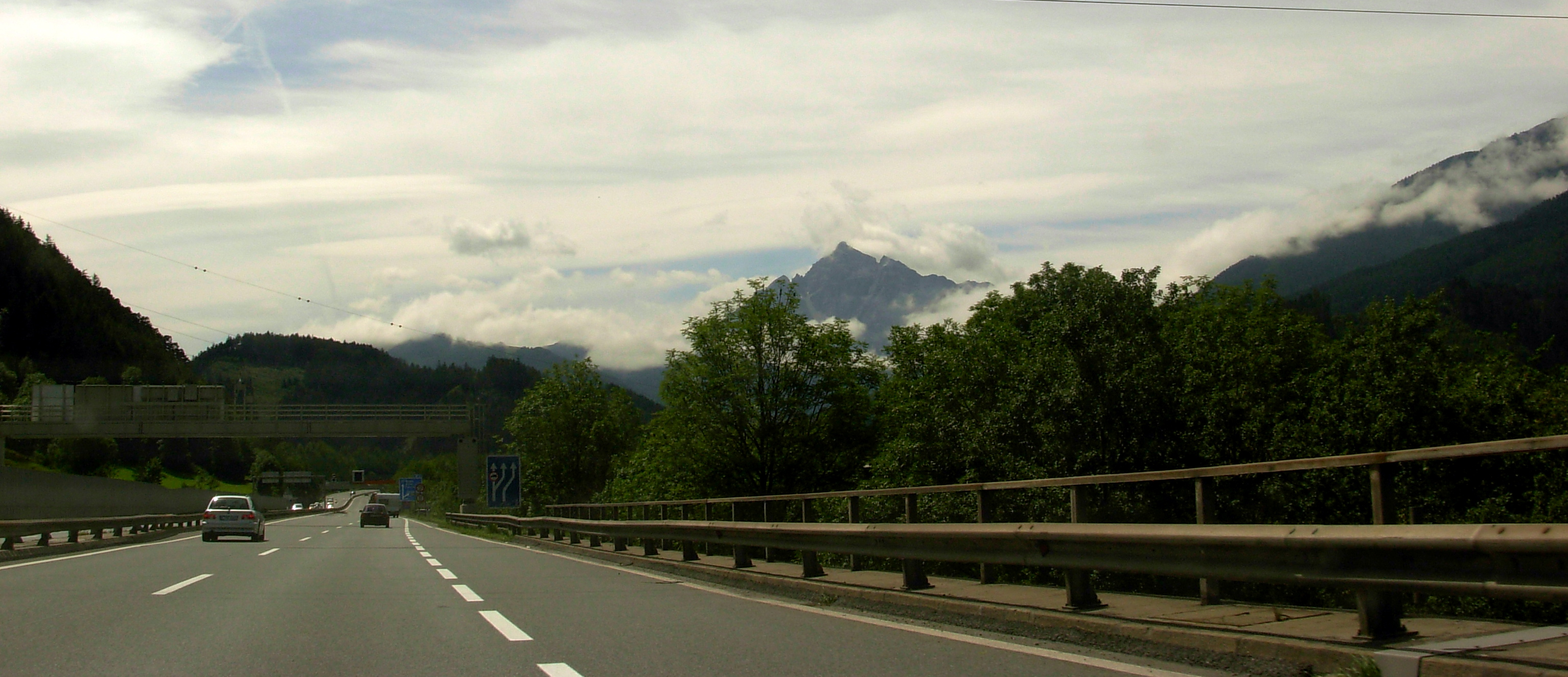 Brenerio autostrada/Brenner autobahn